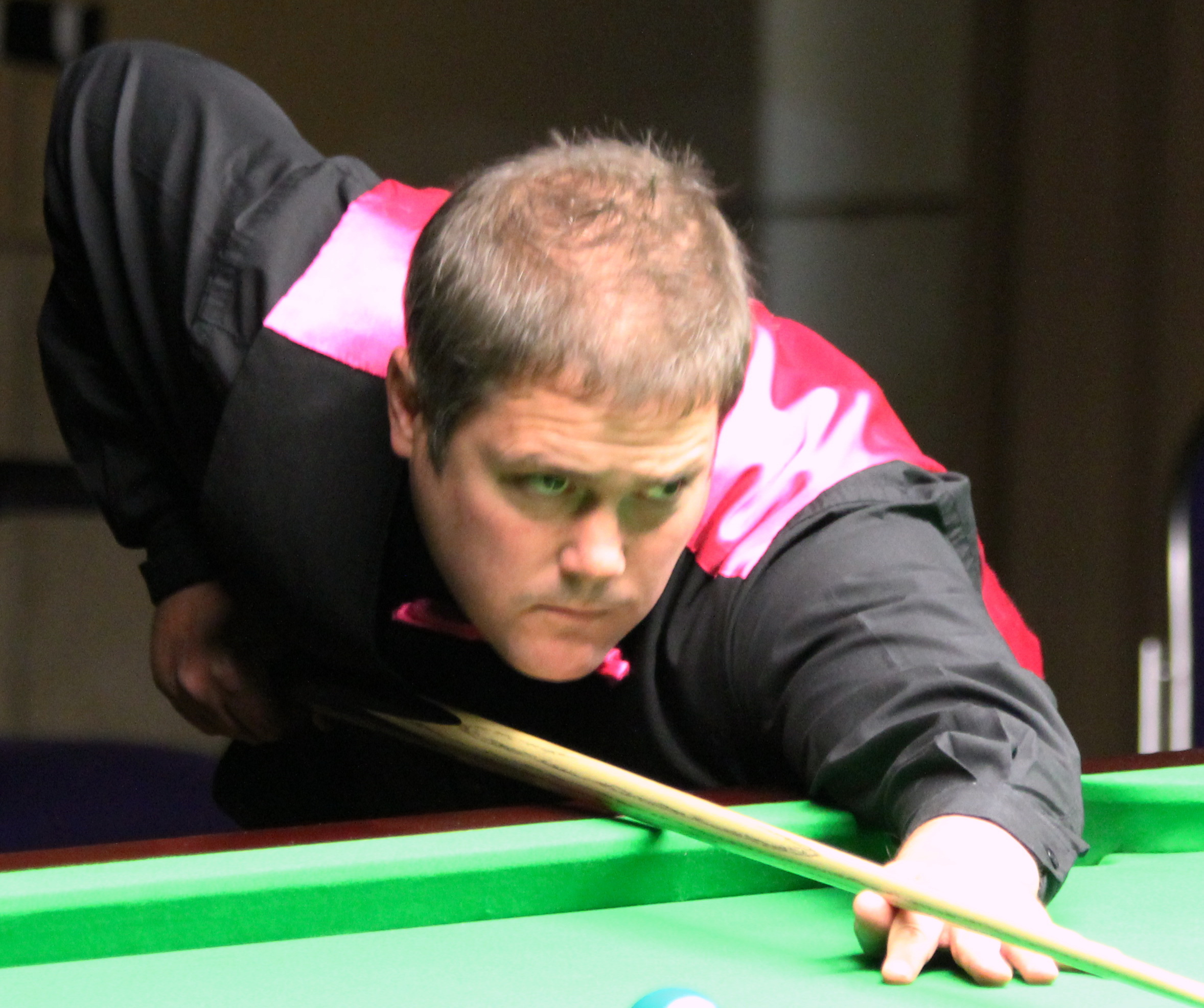 Robert Milkins beim Paul Hunter Classic 2012